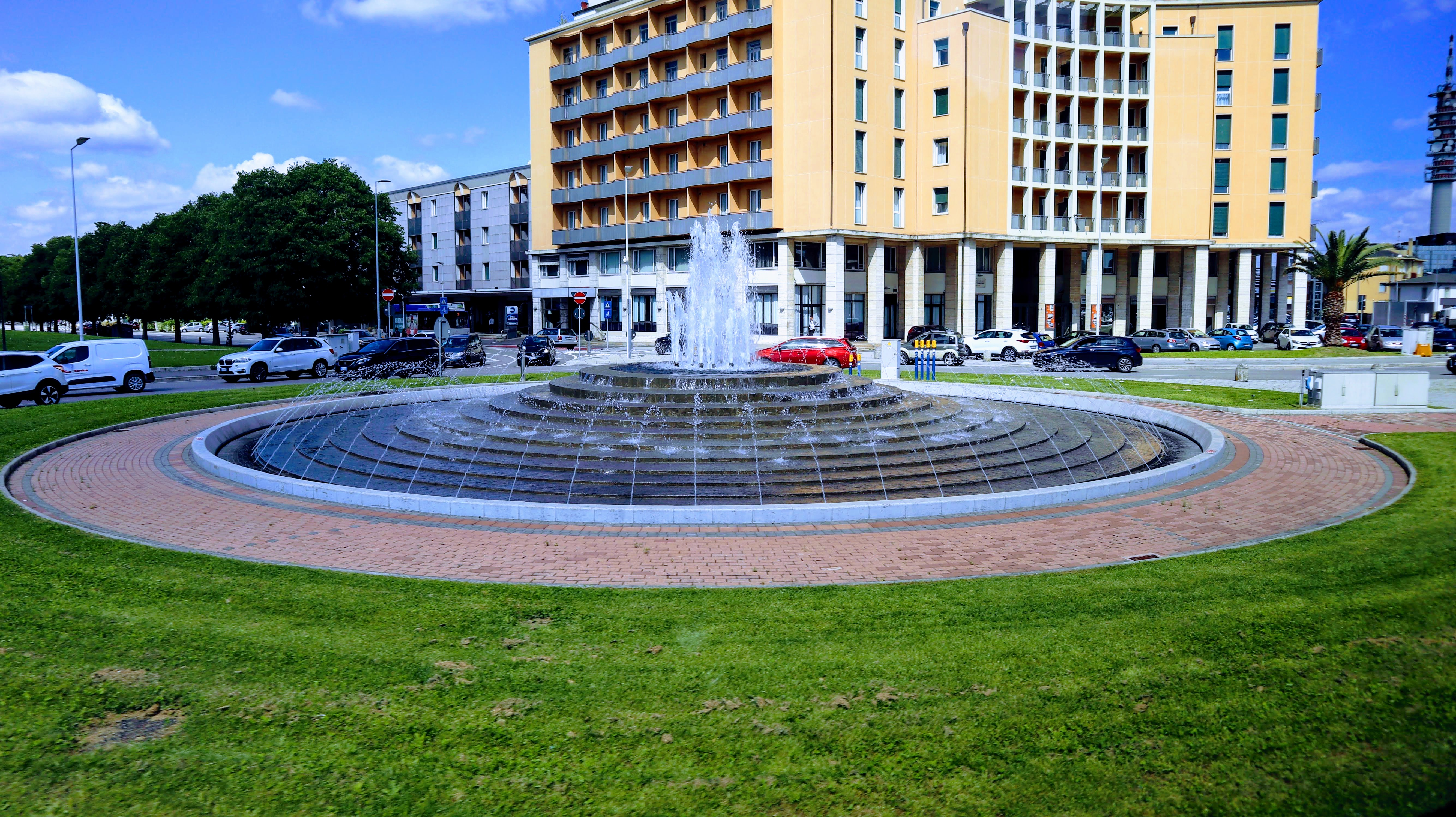 fontana piazzale della Stanga, Padova